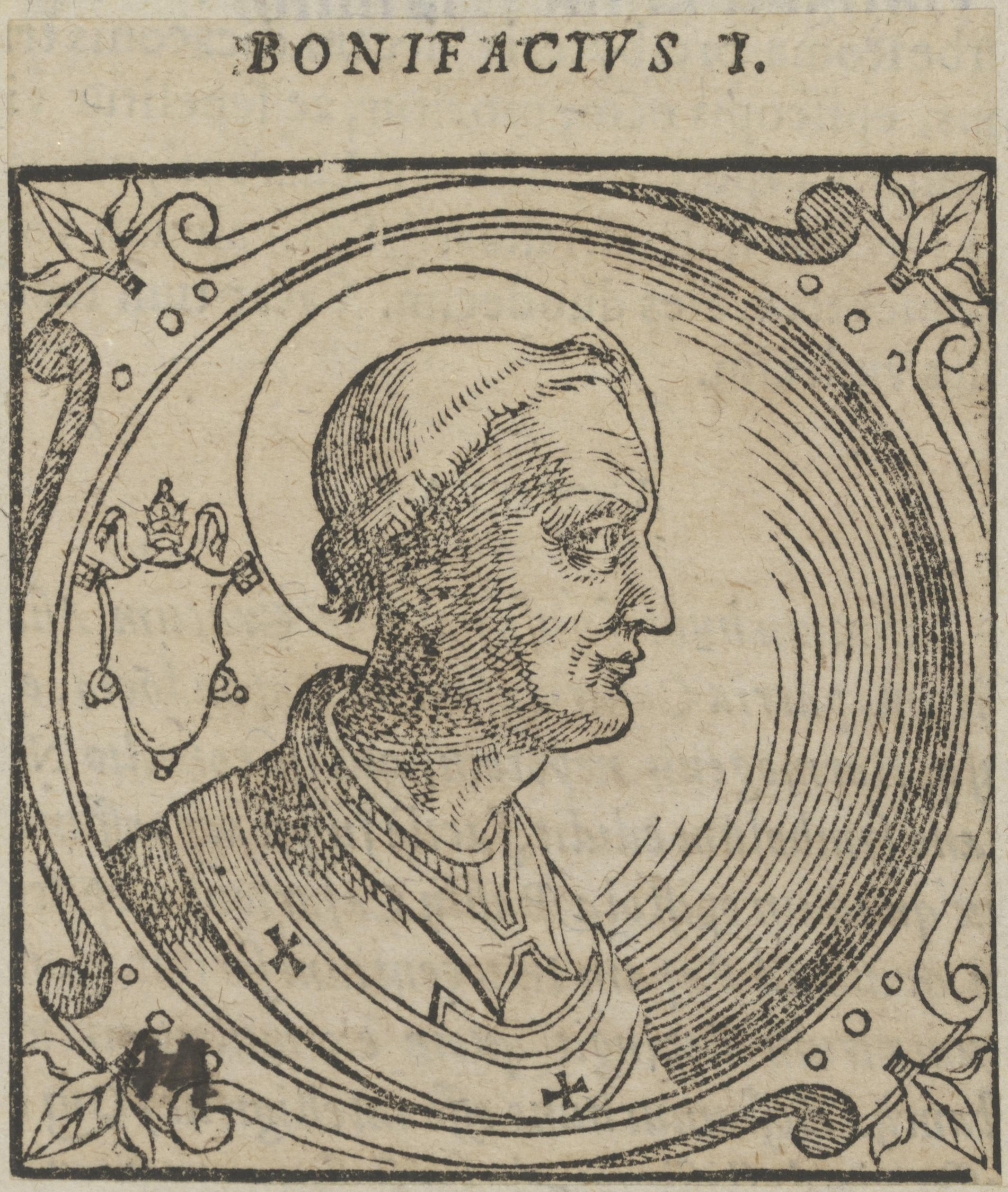 Bonifatius I., Fantasieportrait um 1550–1650; Holzschnitt. 69 x 59 mm (Blatt) Berlin, Staatsbibliothek zu Berlin - Preußischer Kulturbesitz, Handschriftenabteilung, Inventar-Nr. Portr. Slg / Slg Hansen / Päpste / 2° / Bd. 47 / Nr. 30